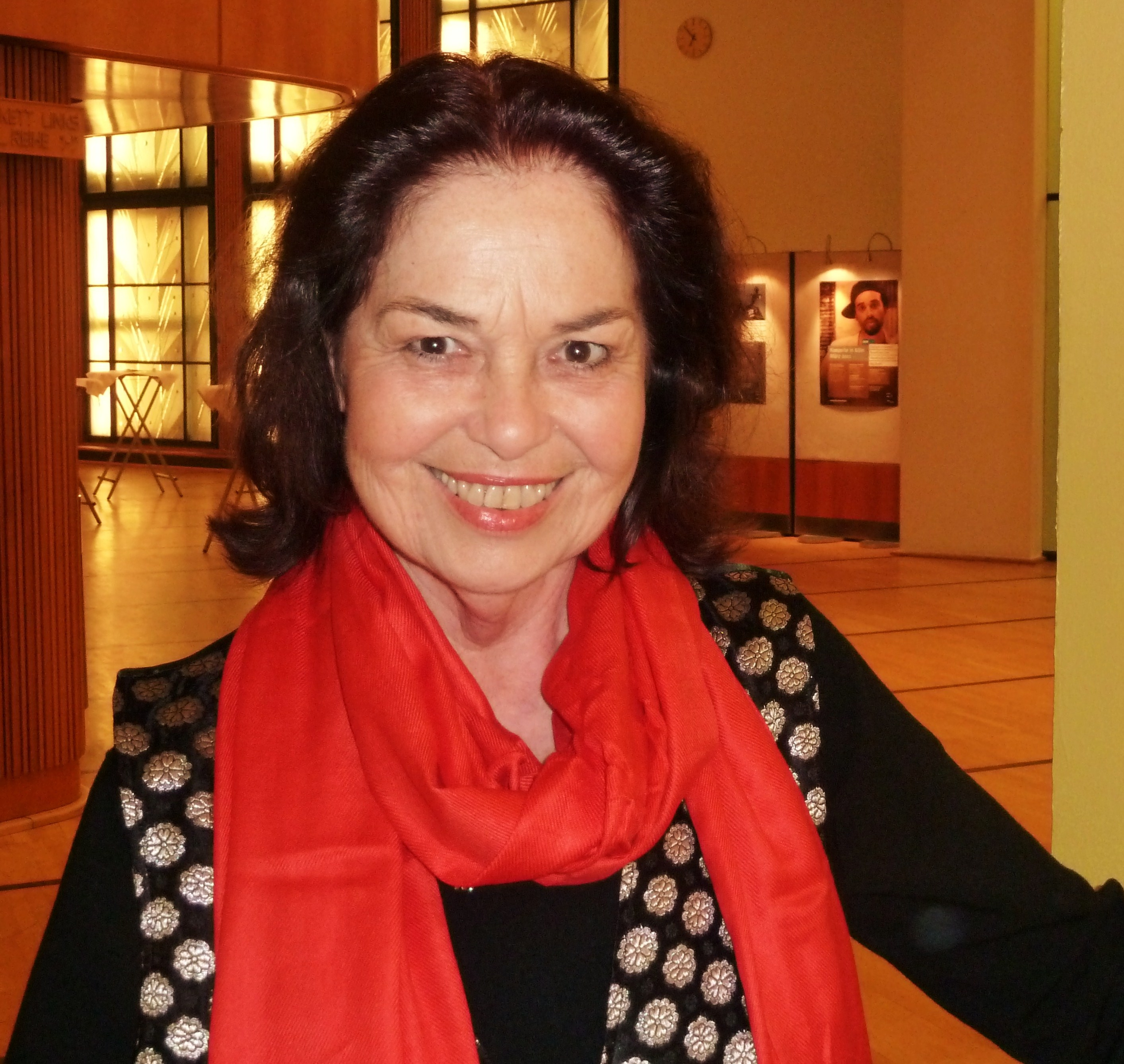 Regina Lemnitz im WDR-Funkhaus in Köln